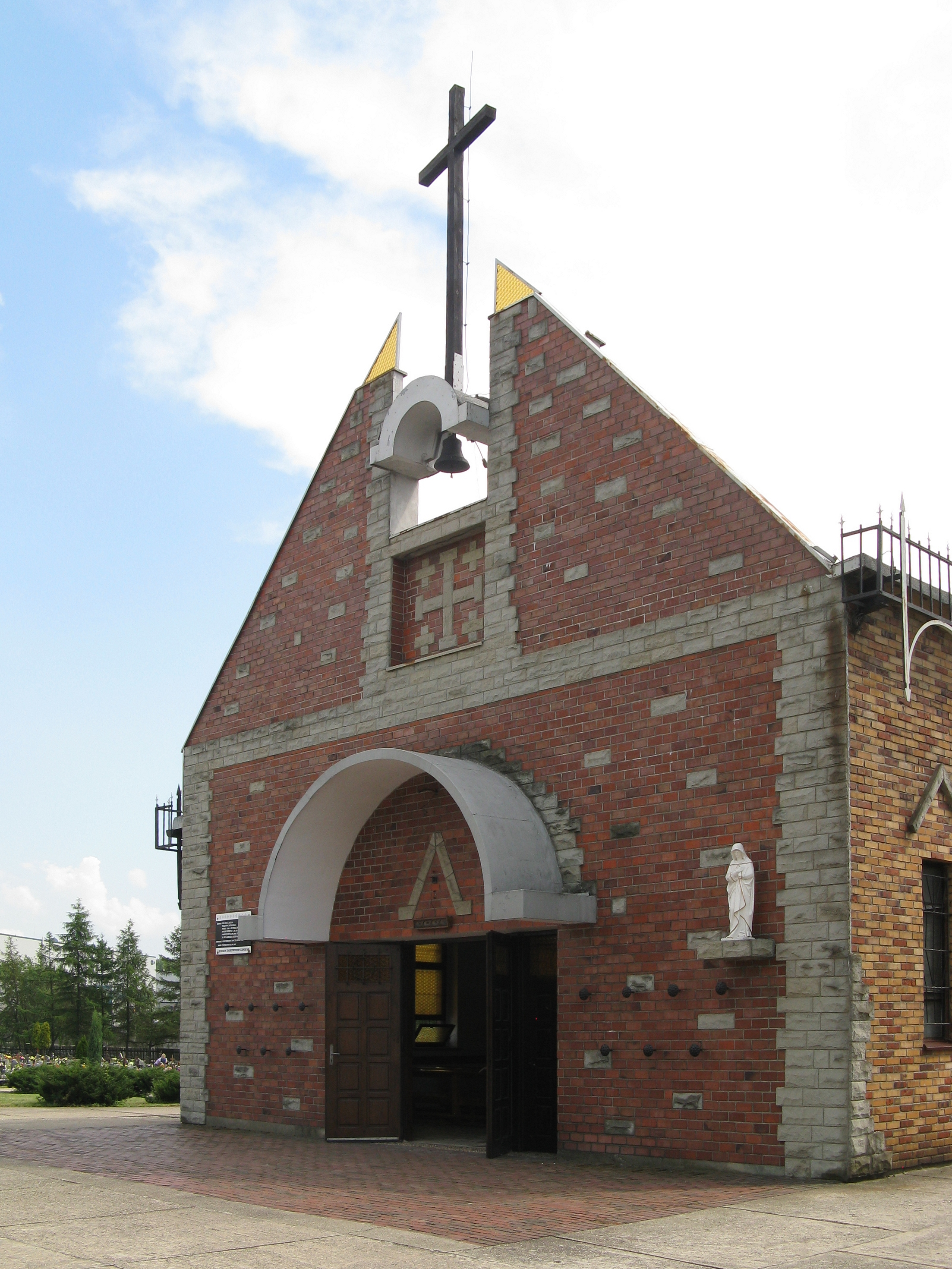 Kaplica pw. Pana Jezusa Zmartwychwstałego w Chorzowie, ul. Niedźwiedziniec.